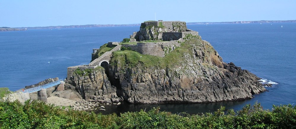 Fort de Bertheaume, dans le Finistère